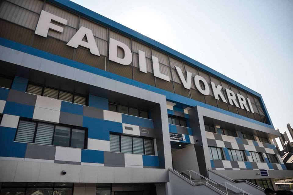 Pjese nga fasada kryesore e stadiumit "Fadil Vokrri"